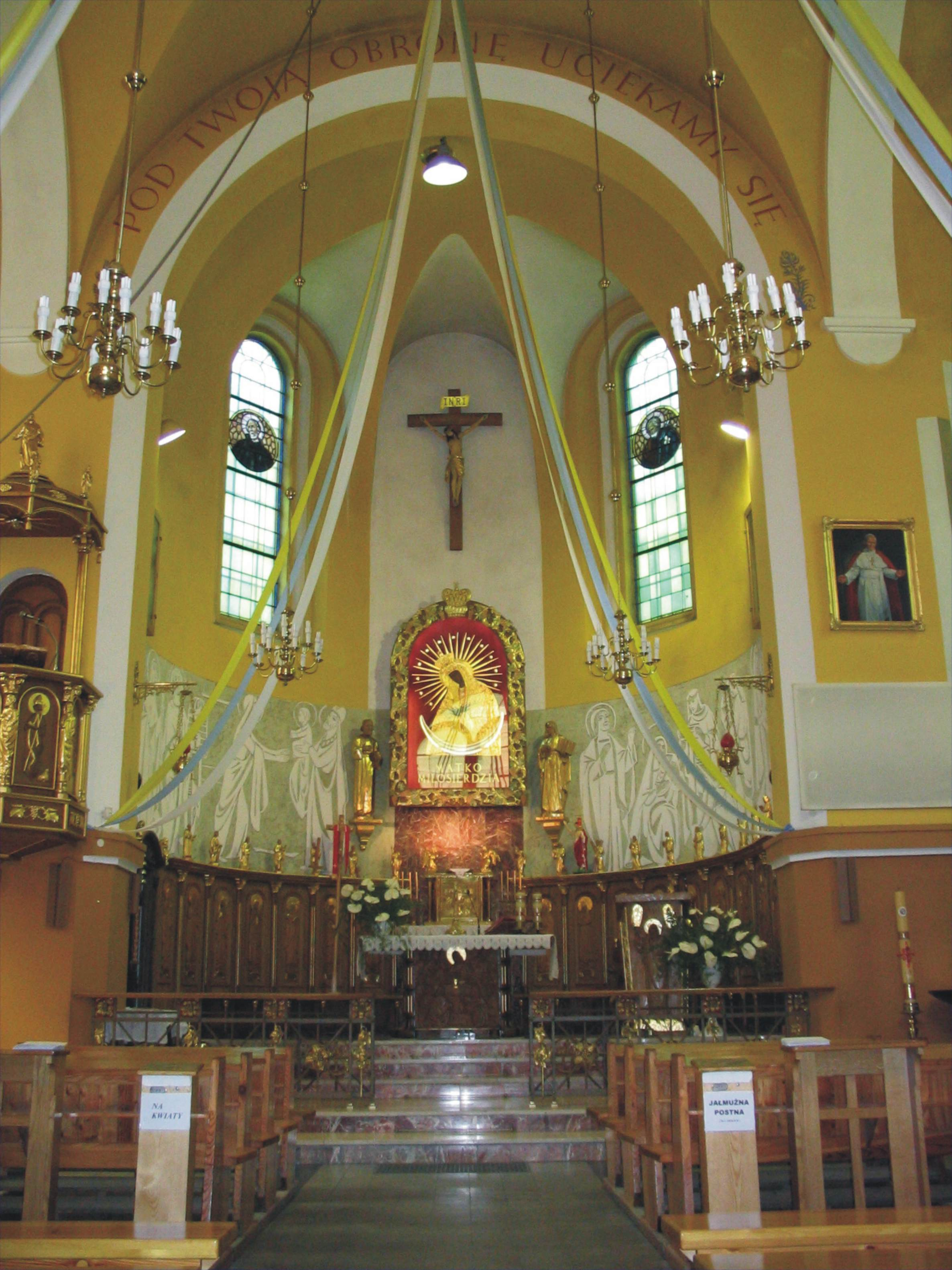 Prezbiterium kościoła MB Ostrobramskiej w Chrzanowie